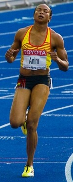 Vida Anim, Berlin 2009